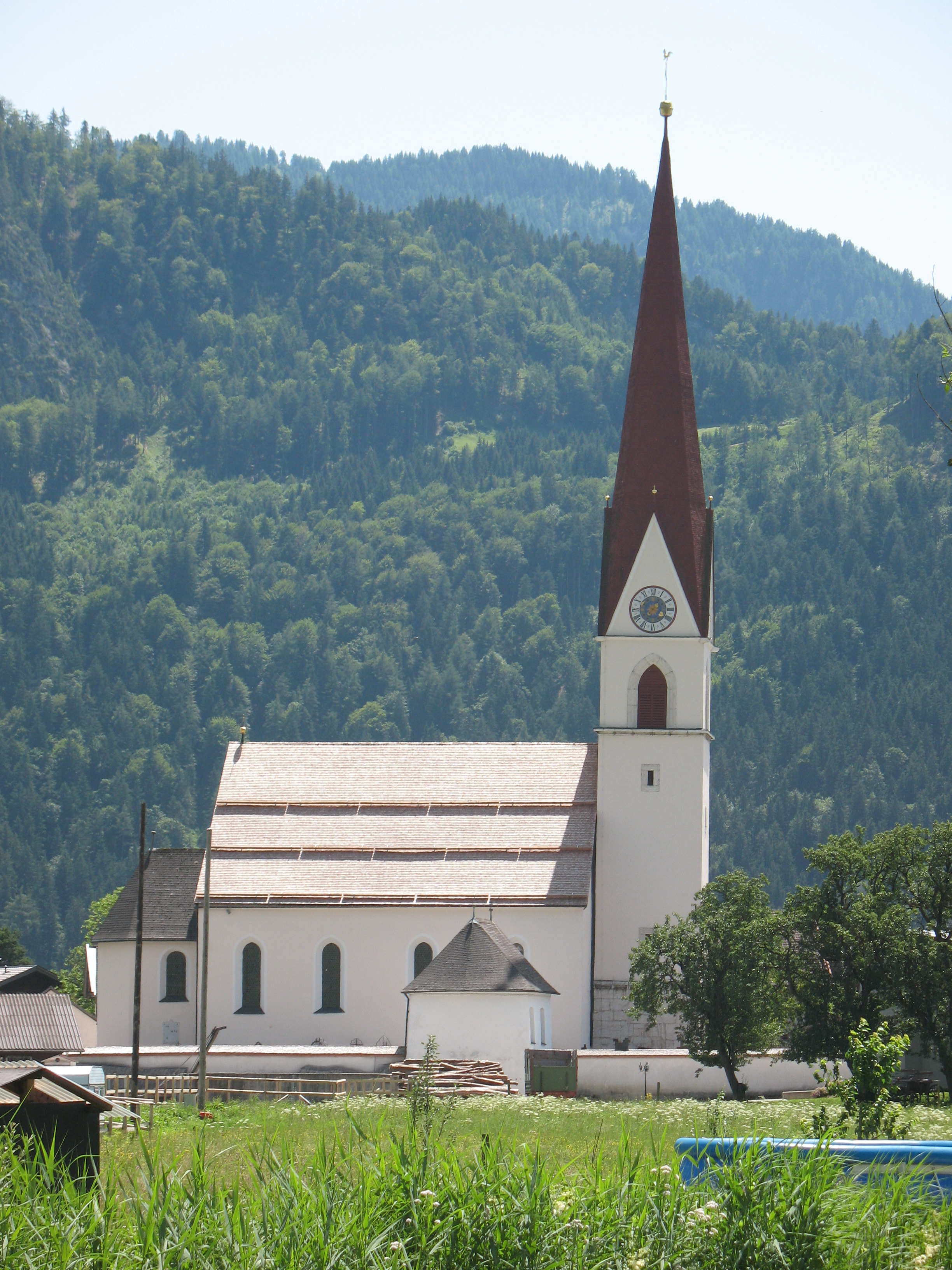 Kath. Pfarrkirche hl. Nikolaus und Kriegerdenkmal